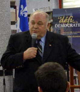 Conférence de Michel Bissonnet à l'École secondaire Armand Corbeil dans la ville de Terrebonne, le 22 Novembre 2004. Michel Bissonnet, (28 mars 1942 - ) est un homme politique québécois. Il a été le député provincial de la circonscription de Jeanne-Mance puis de Jeanne-Mance—Viger de 1981 à 2008. Durant ses 27 ans comme député, il a notamment occupé le poste de président de l'Assemblée nationale du Québec du 4 juin 2003 au 14 juillet 2008. Il est actuellement le maire de l'arrondissement de Saint-Léonard de la ville de Montréal. Il a été élu sous la bannière d'Équipe Tremblay - Union Montréal lors des élections partielles du 21 septembre 2008.